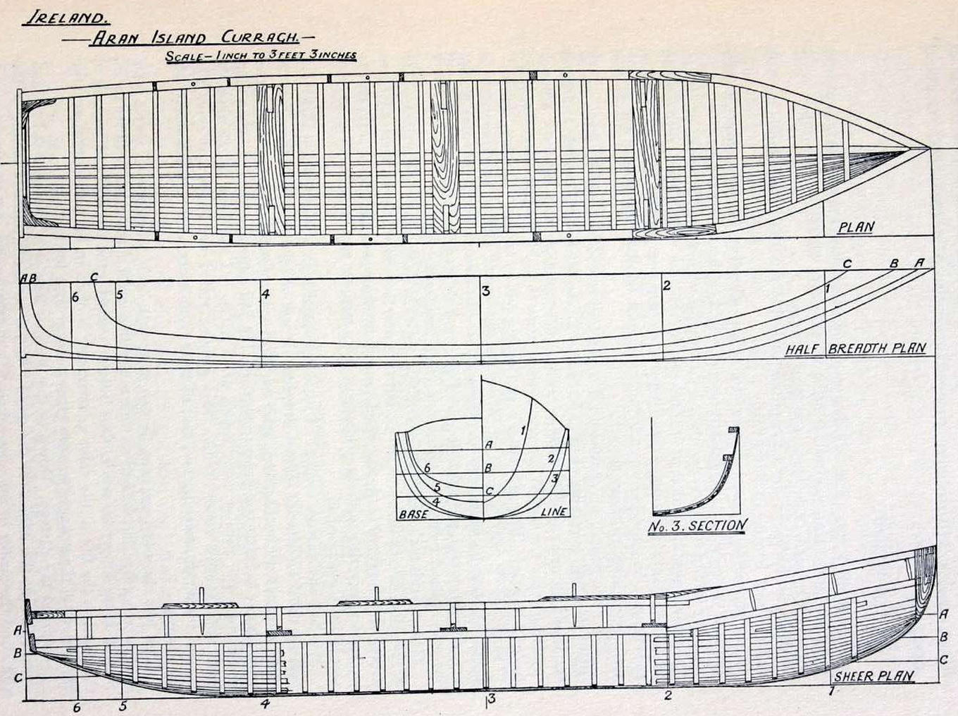 Теоретический чертёж курраха острова Аран